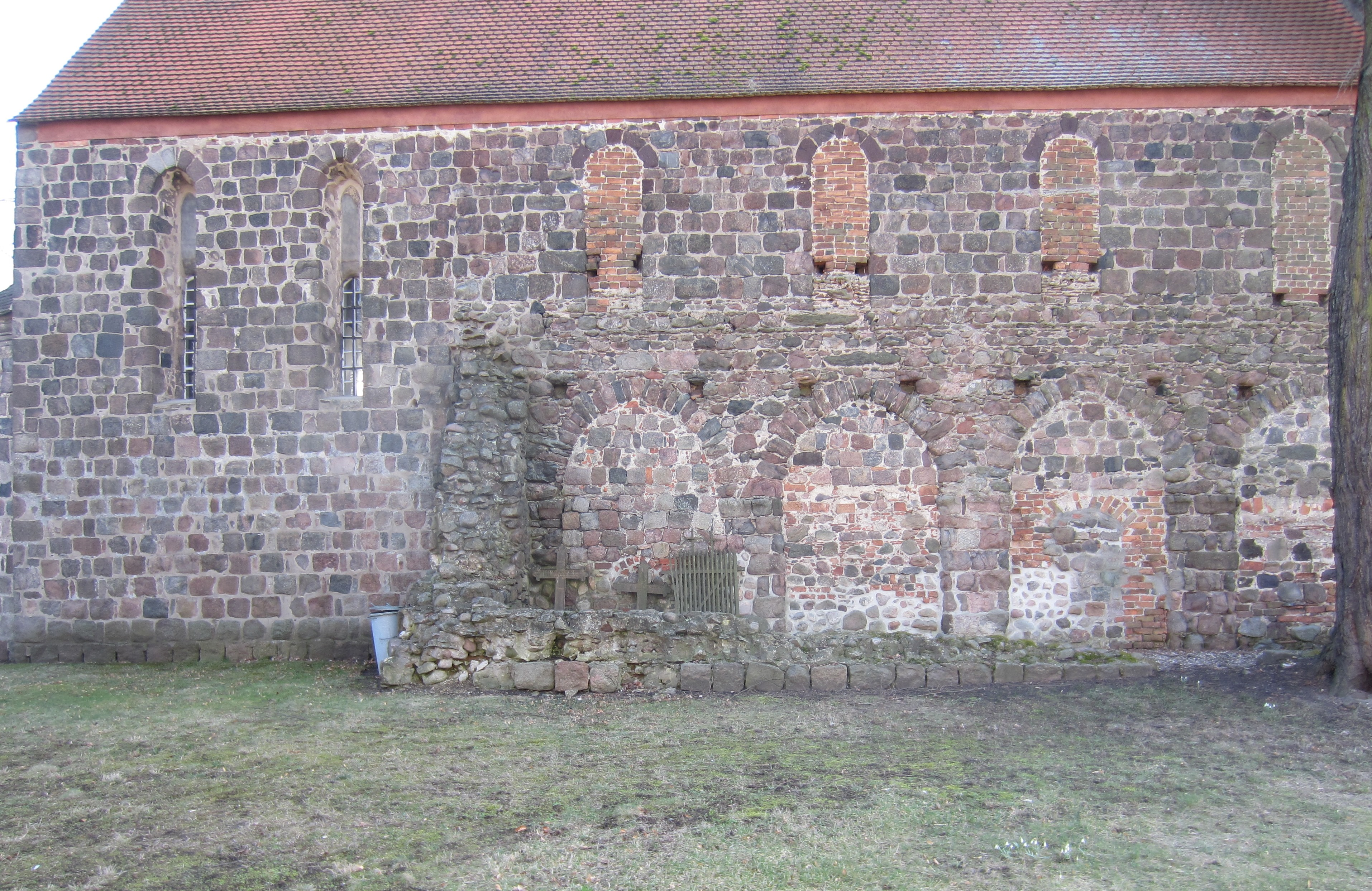 Massen, Gemeinde Massen-Niederlausitz, denkmalgeschützte Dorfkirche, Nordfassade mit vermauerten Obergadenfenstern und Mittelschiffsarkaden